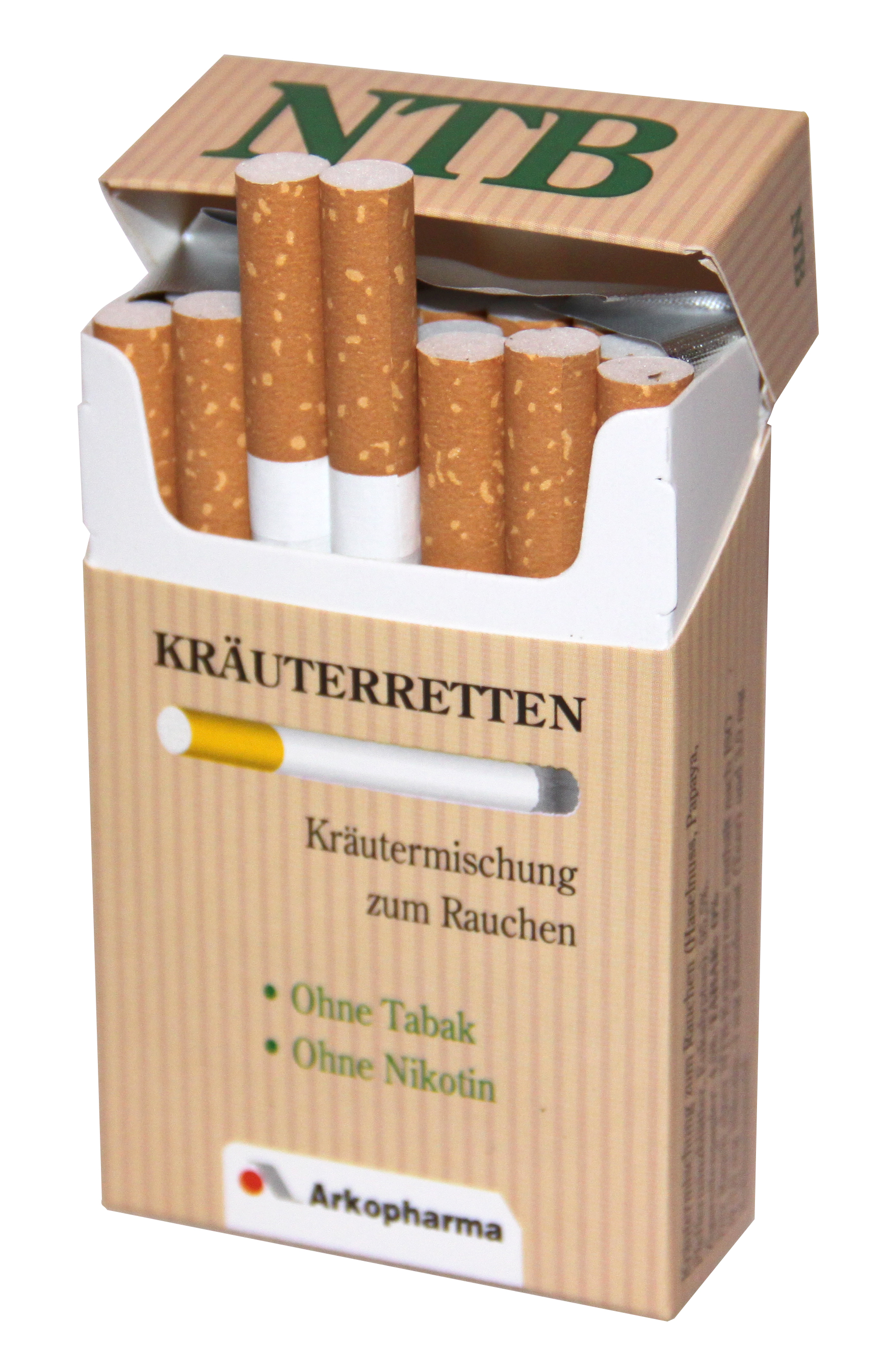 NTB Kräuterretten Kräuterzigaretten offene Packung